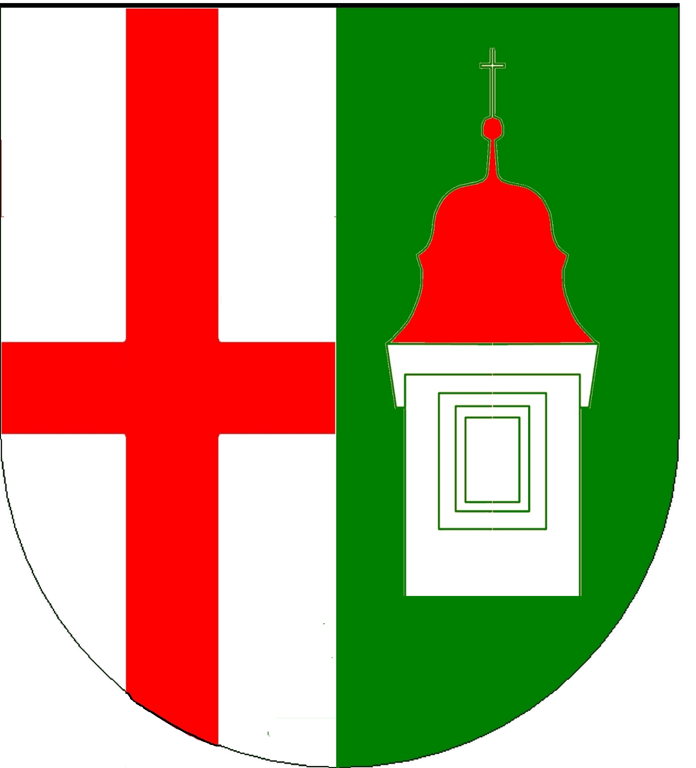 Stříbrno-zeleně polcený štít. Ve stříbrném poli červený svatojiřský heroltský kříž, v zeleném bílá věž s jedním oknem a s červenou střechou.